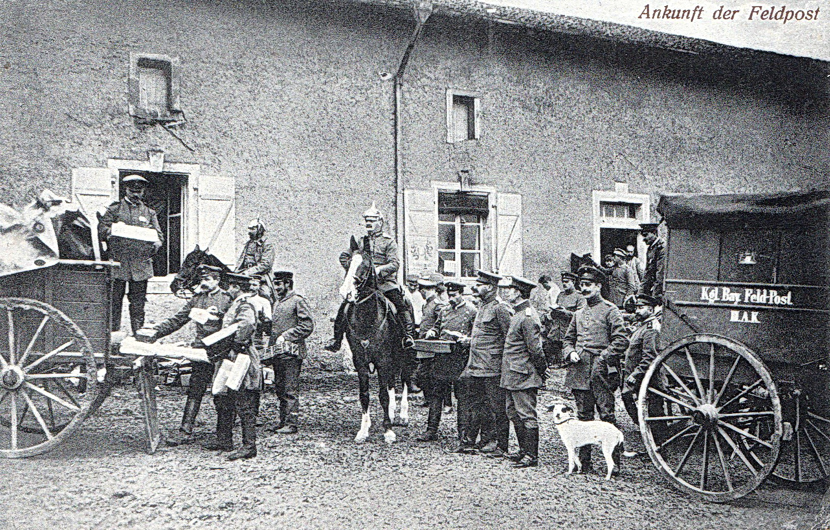 Ankunft der Königlich Bayerischen Feld-Post im Felde während des Ersten Weltkrieges